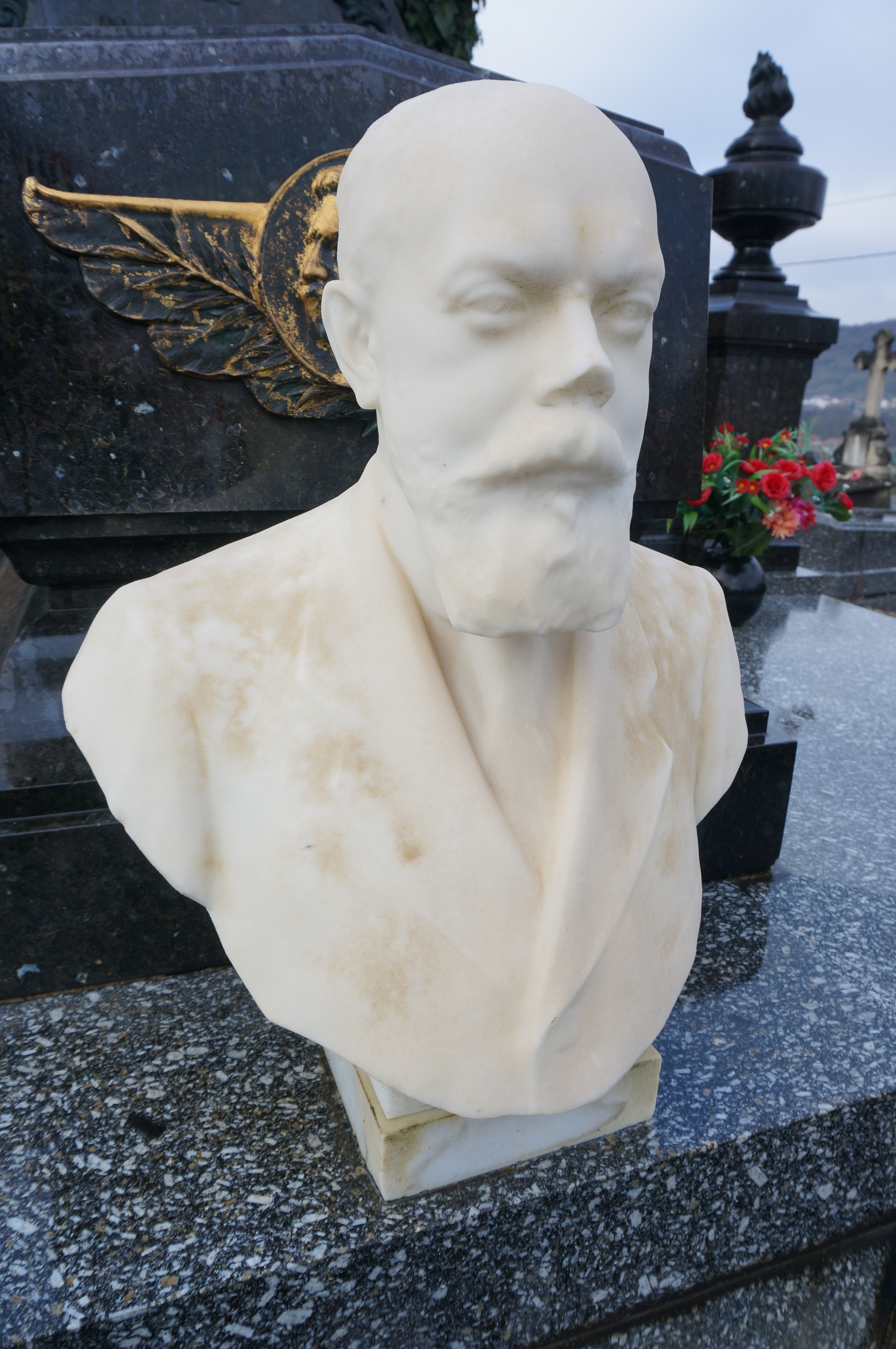 Vue de Jules Munier sur la tombe familliale au cimetière de Fraouard.